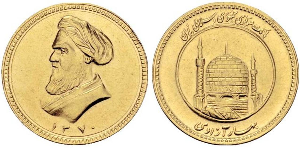 نخستین سکه بهار آزادی طرح جدید با تصویر نیمرخ چپ روح الله خمینی